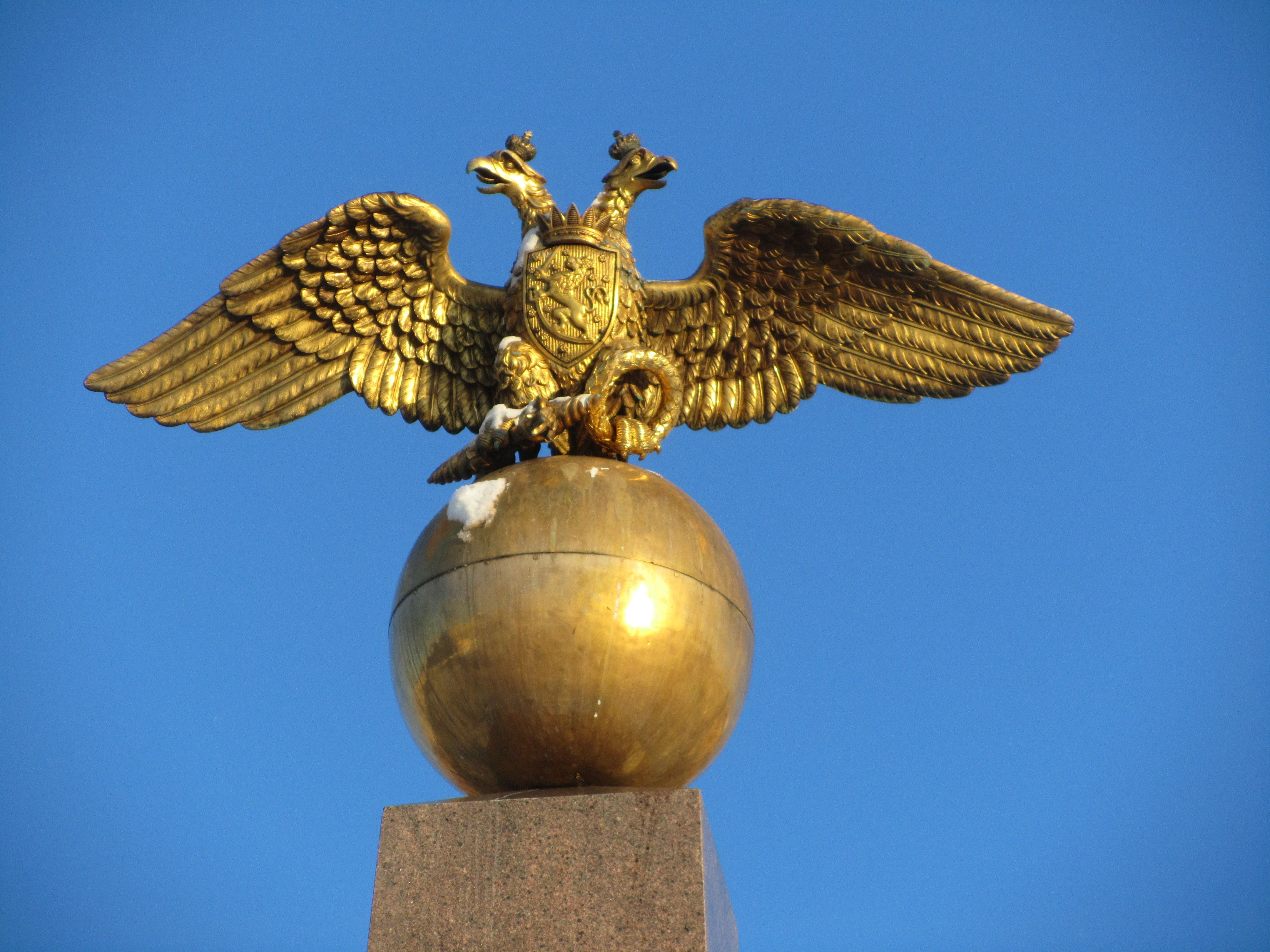 Keisarinnankivi (1835) - Carl Ludvig Engel. Sijainti: Kauppatori, Kaartinkaupunki